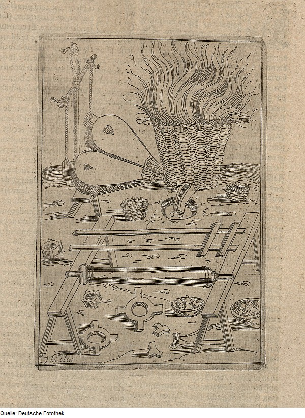 Original image description from the Deutsche Fotothek Kriegskunde & Pyrotechnik & Kanone & Werkzeug